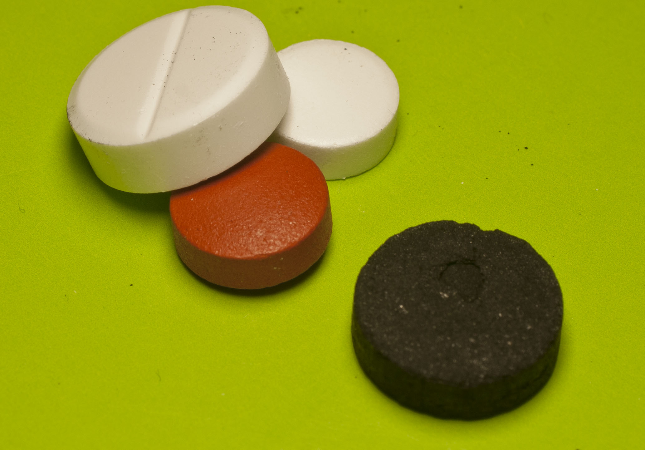 Erinevad tabletid